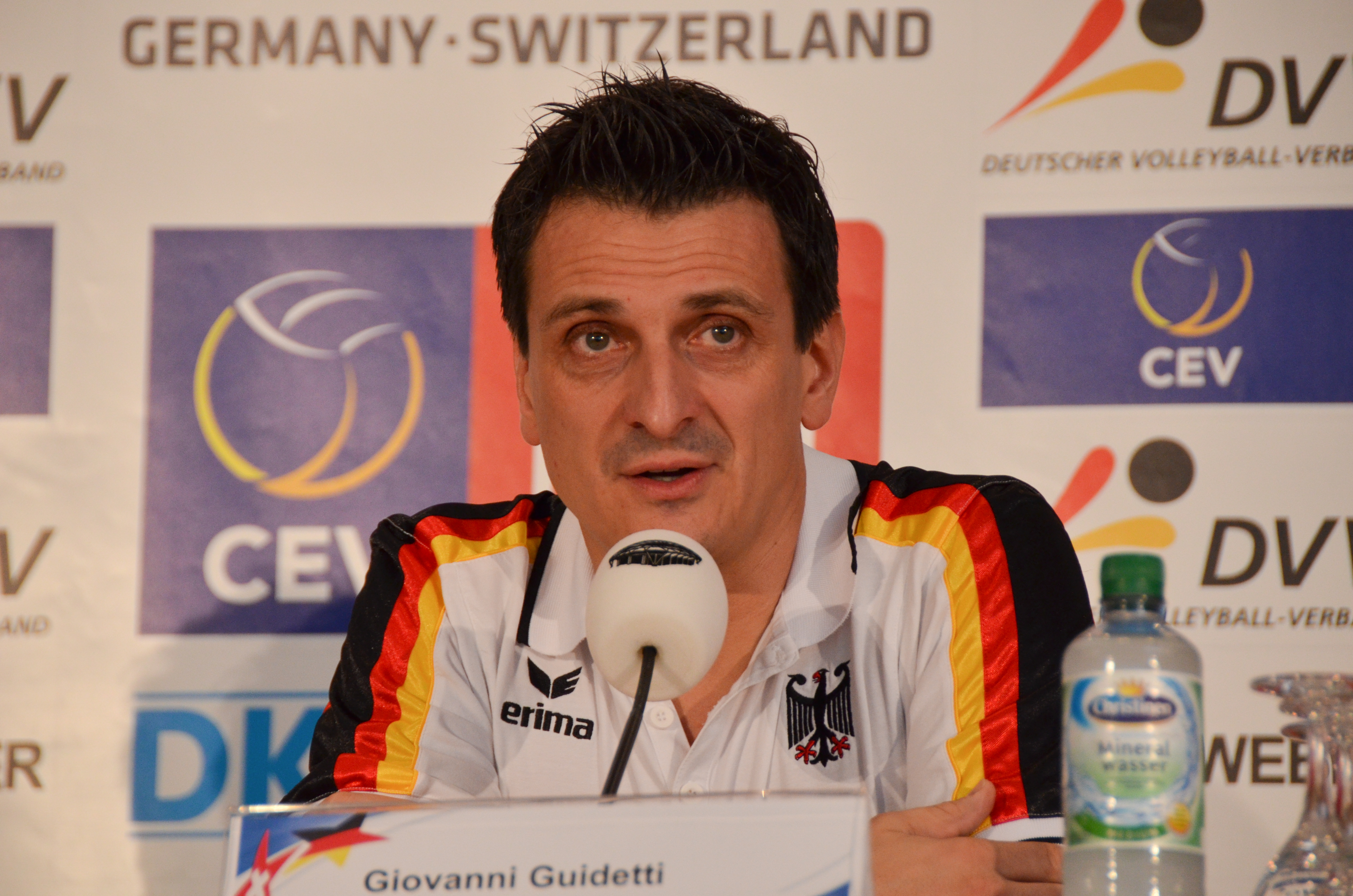 Volleyball-Europameisterschaft der Frauen 2013-Spielort Halle (Westf) Gerry-Weber-Stadion